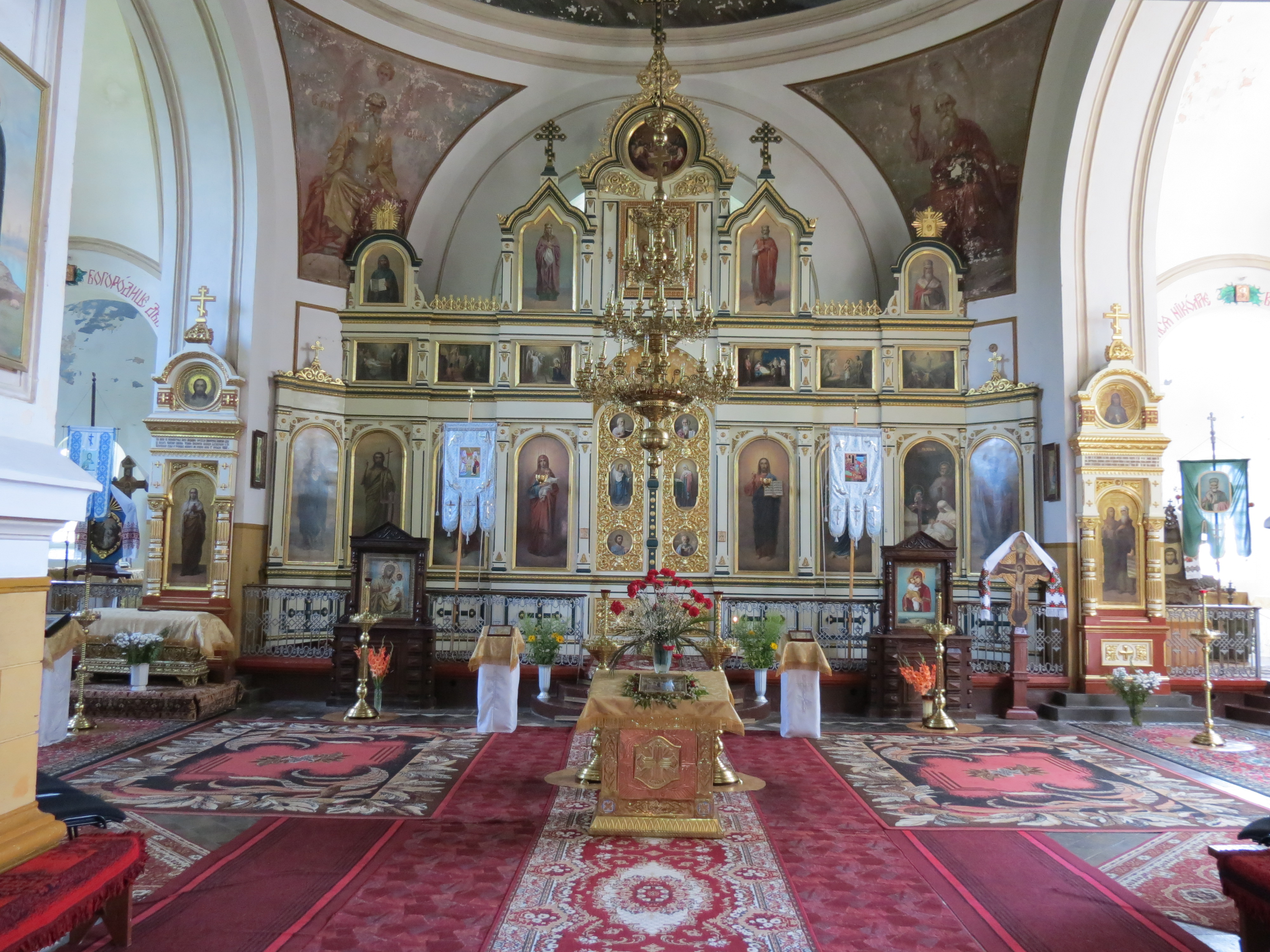 Włodawa, cerkiew prawosławna p.w. Narodzenia Marii, 1840-1842